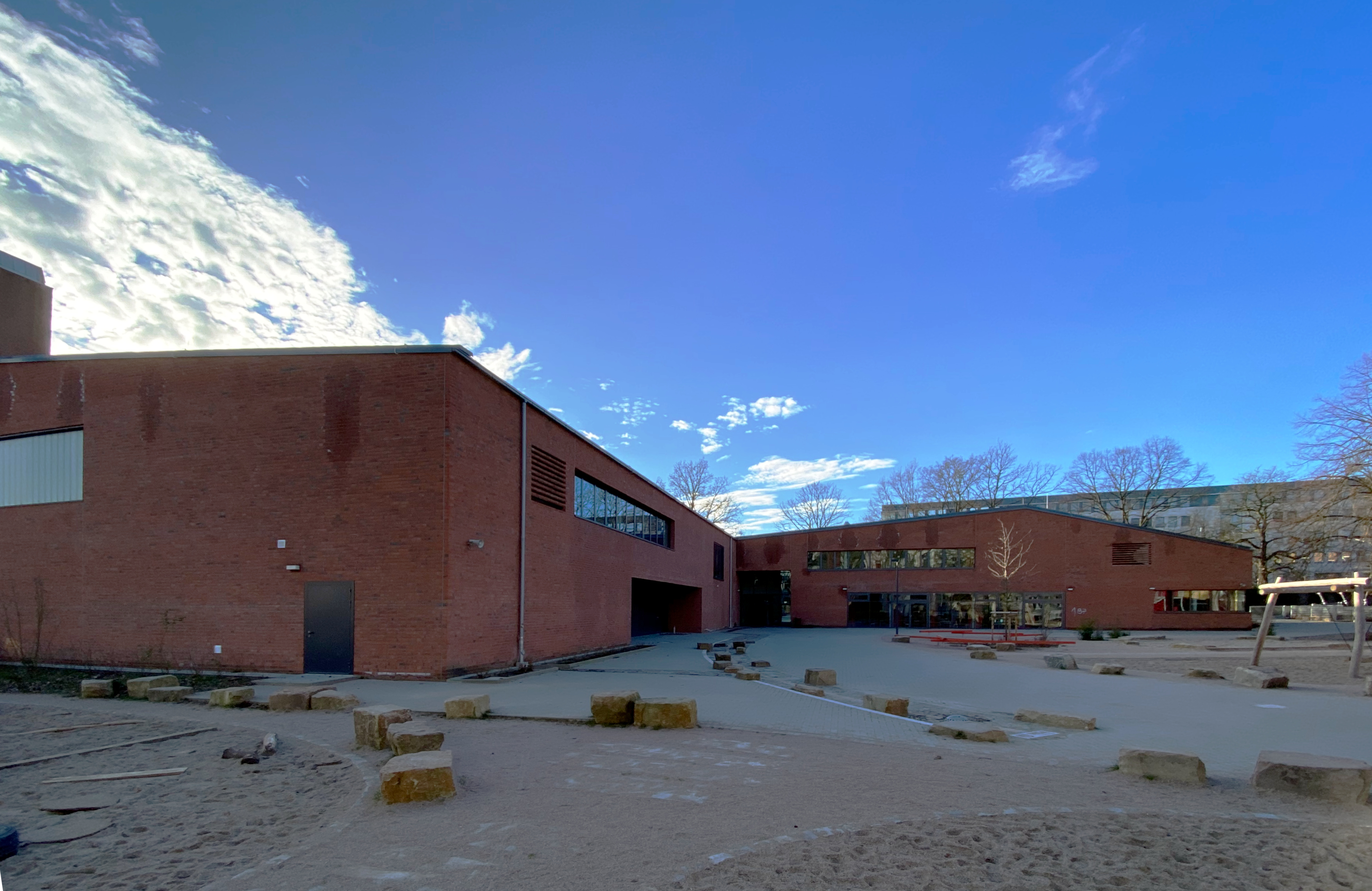 Schule Rellinger Straße in Hamburg-Eimsbüttel, 2018 fertiggestellter Neubau mit Fach­räumen, einer Bibliothek, einer Mensa sowie einer Zweifeld-Sporthalle, vom Schulhof aus gesehen.